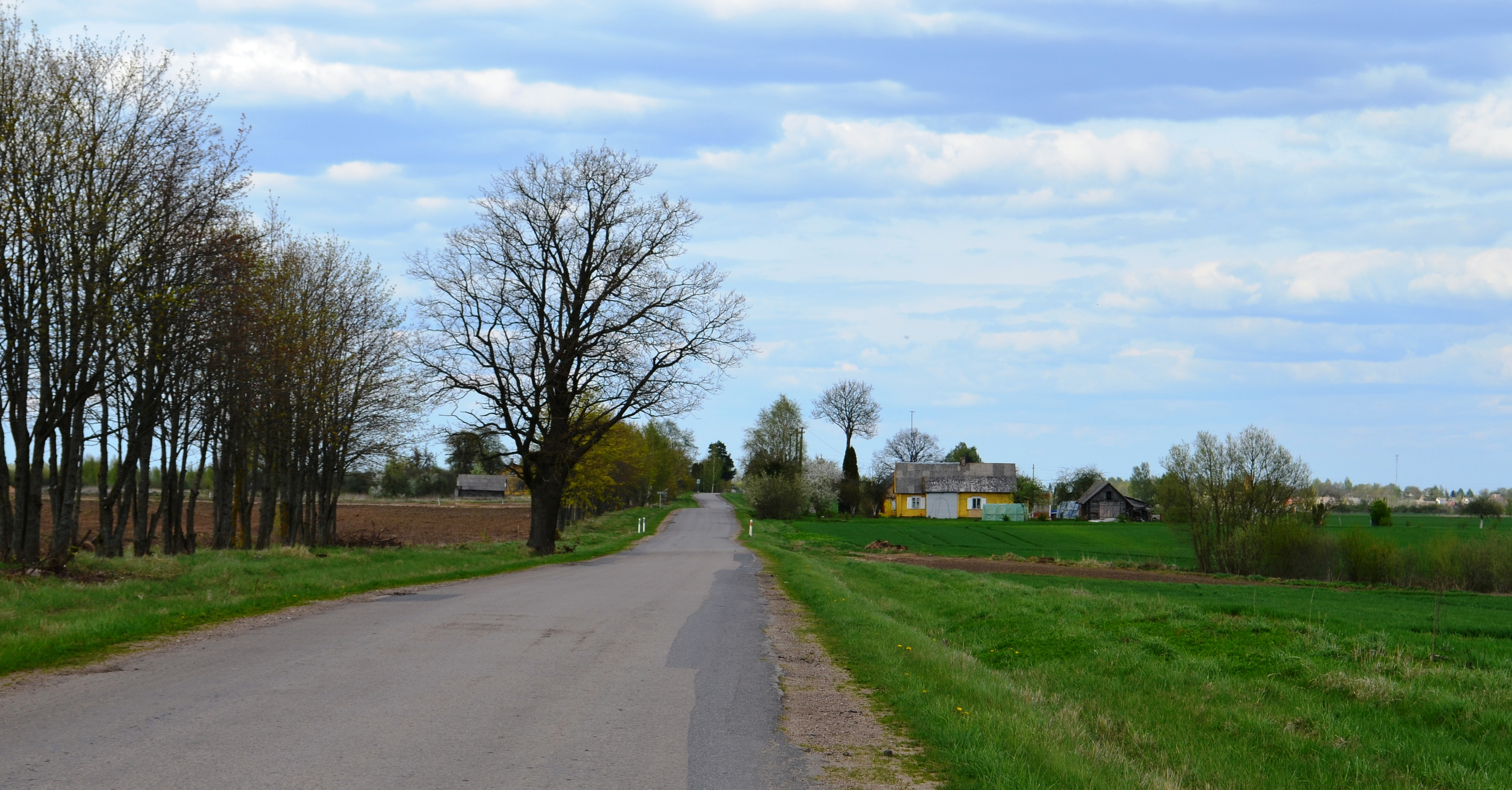 Liliūnų k., Kėdainių r.